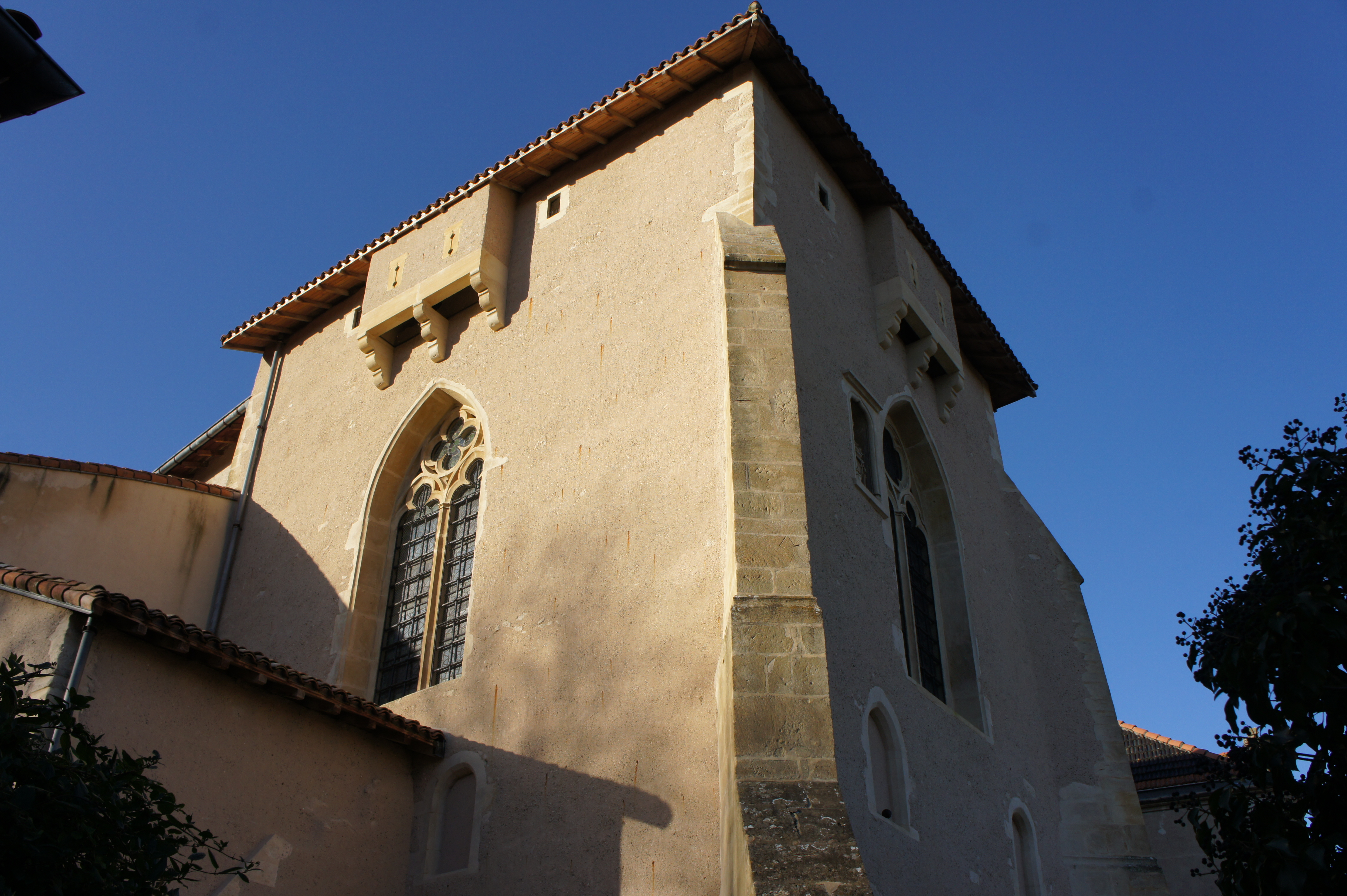 Eglise Saint-Pierre de Norroy-le-Veneur, Moselle